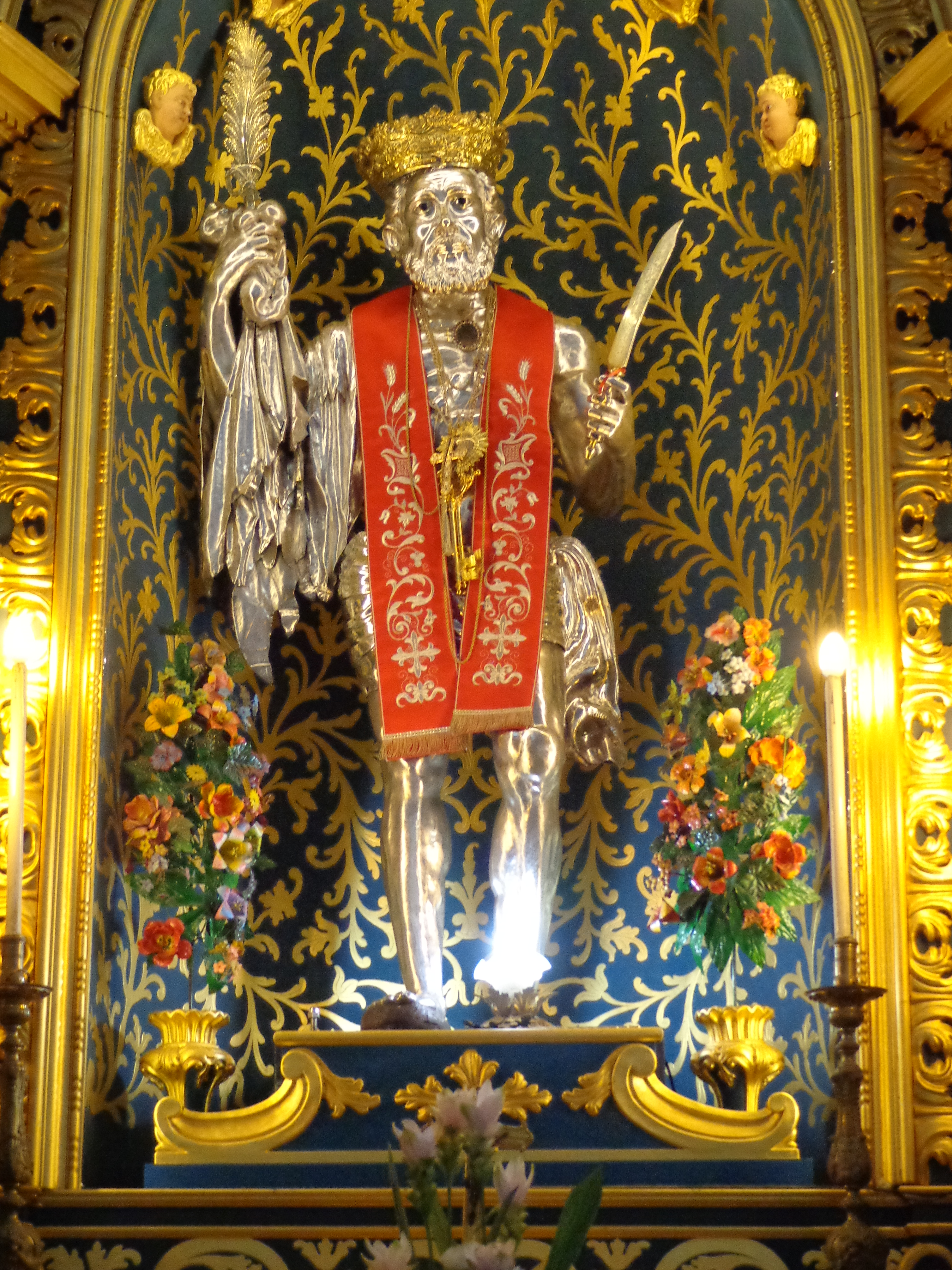 Primo piano statua di San Bartolomeo Apostolo